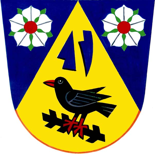 Znak obce Vranová